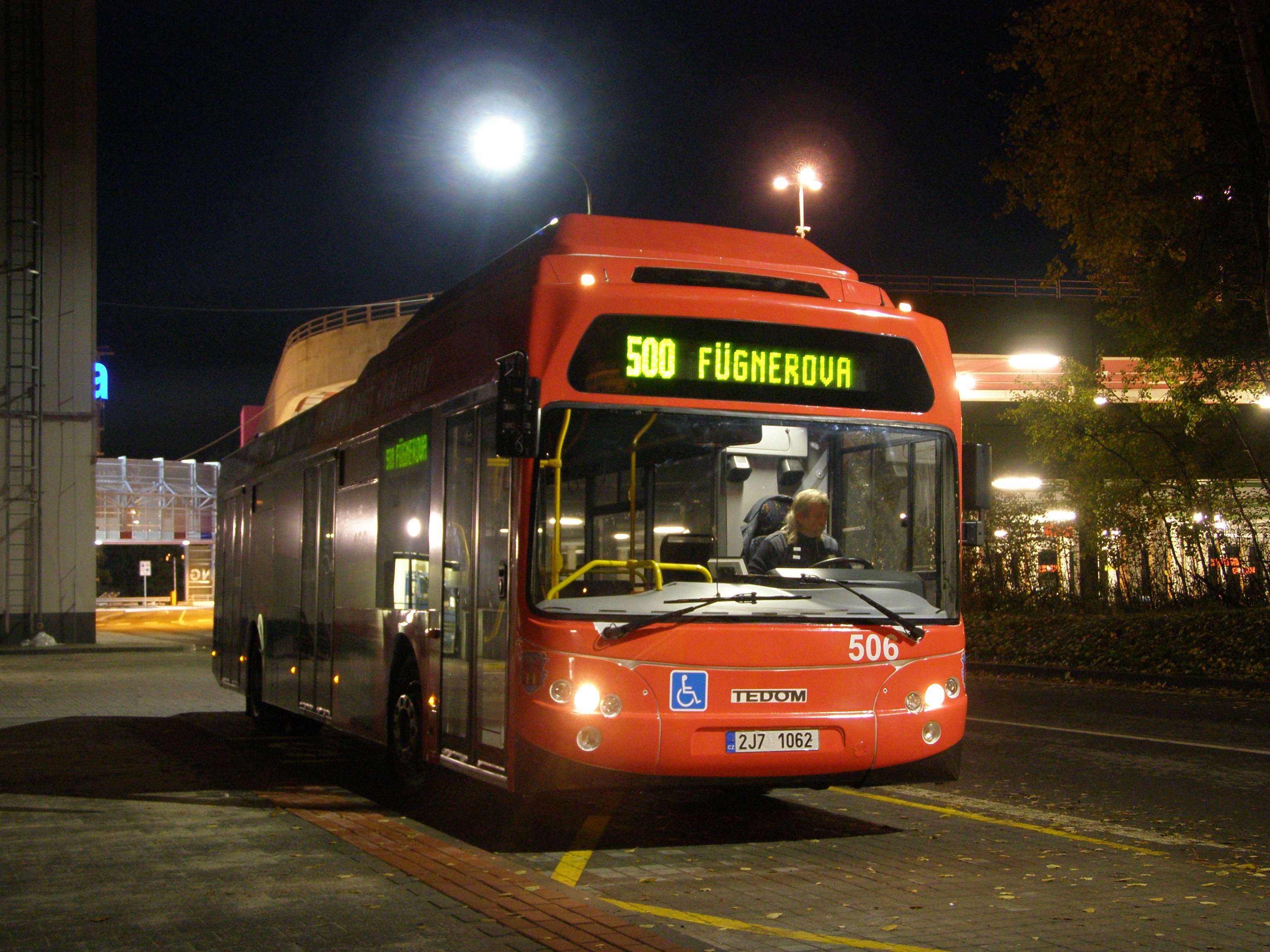 Autobus Tedom na lince 500 vyčkává na historicky první odjezd této linky z nové zastávky OC Nisa.